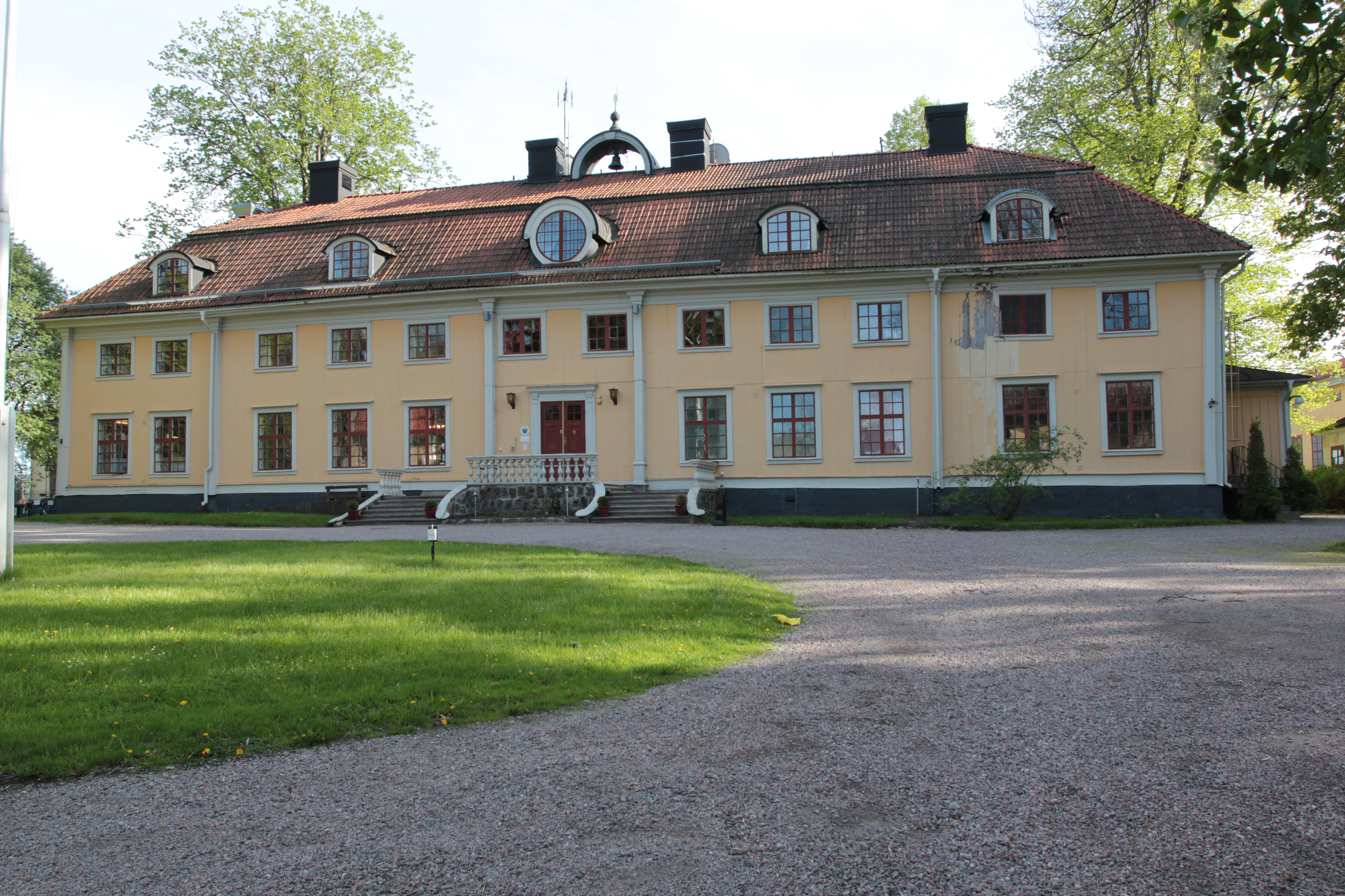 Herrgården, Söderfors bruk. Foto uppladdat som en del i Bergslagssafarin 26 maj 2012.